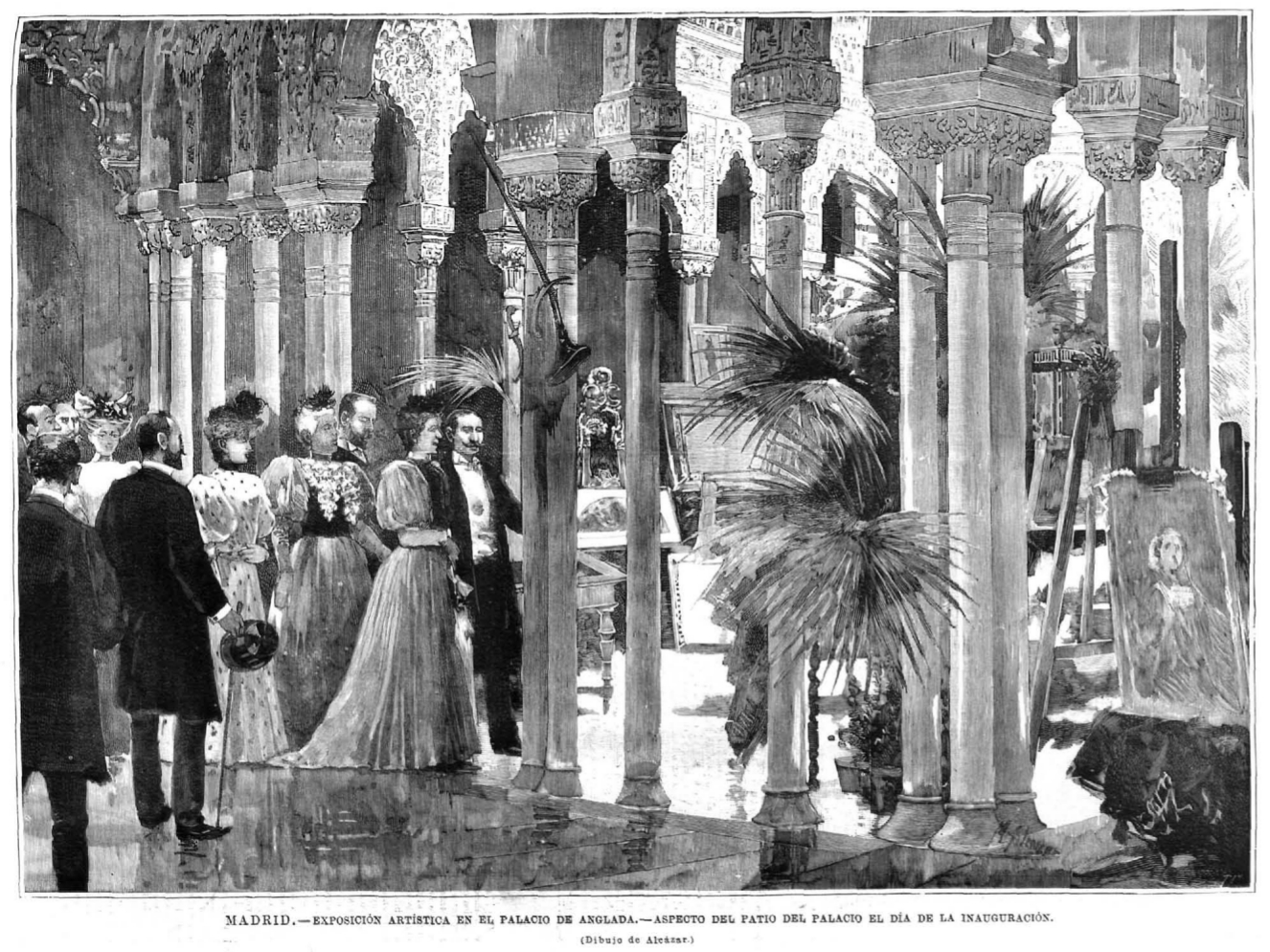 Madrid. Exposición artística en el Palacio de Anglada. Aspecto del patio del palacio el día de la inauguración, en la revista española La Ilustración Española y Americana.